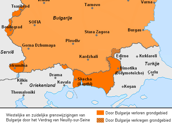 Wijzigingen van de zuidgrens en westgrens van Bulgarije, 1919